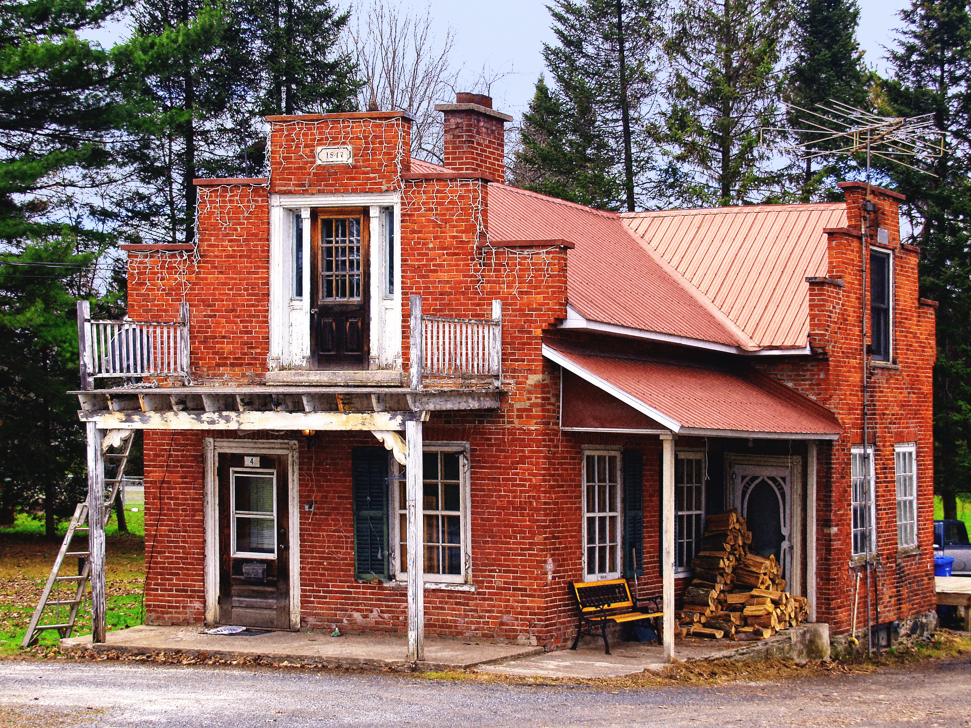 Stanbridge East - Maison de 1812